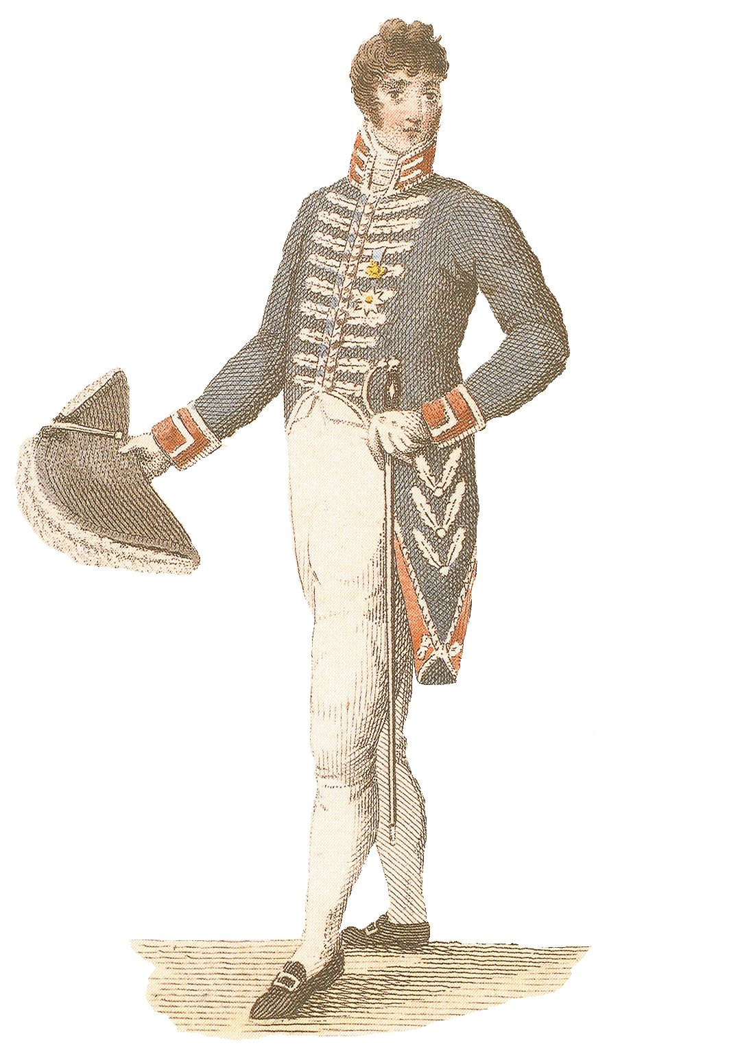 bewerking van de afbeelding in de "Almanac de la Cour" van 1810